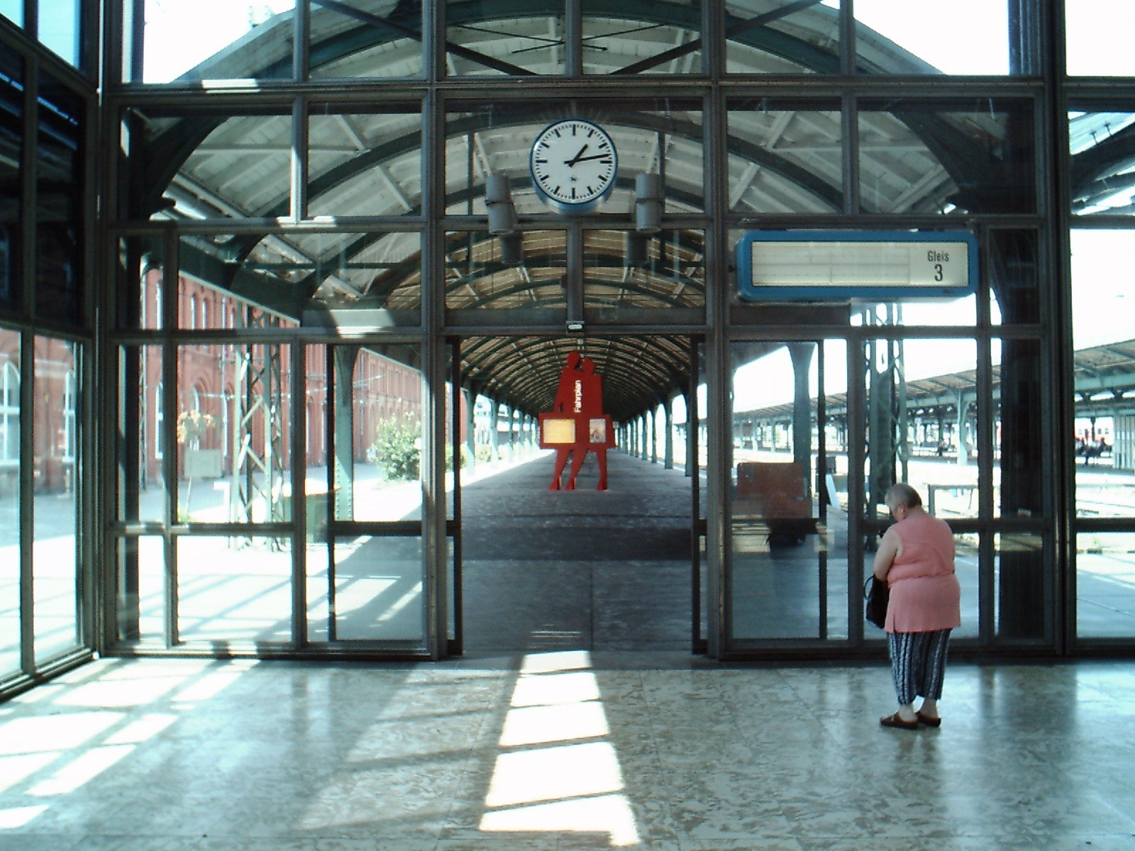 Kopfbahnhof Kassel Hbf Fotograf: presse03, selbst fotografiert, Sommer 2004 Lizenz: GNU-FDL Kategorie:Bild:Bahnhof